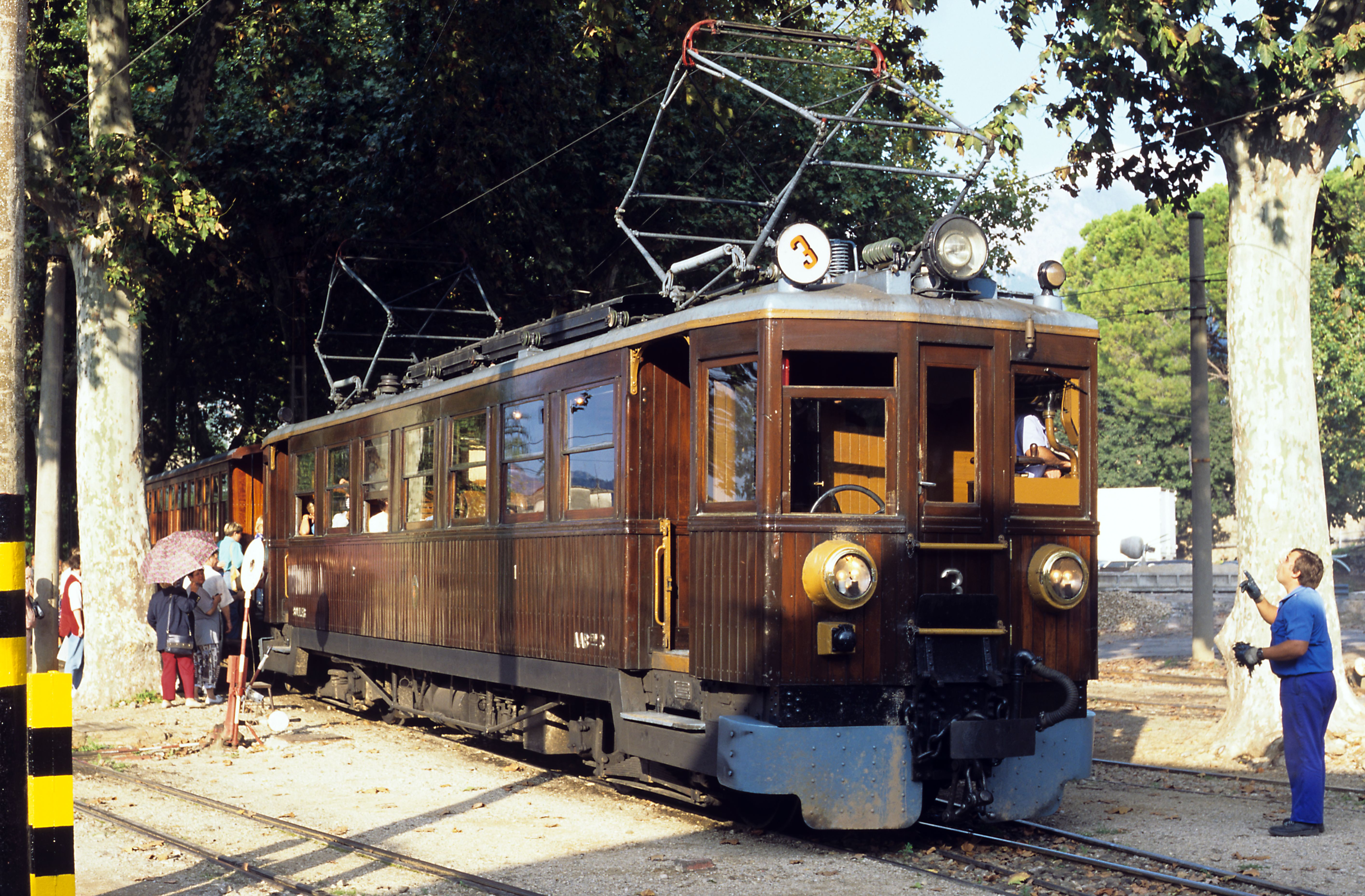 Noch nicht modernisiert, erkennbar an den alten Lampen und am fehlenden Maschinenraum in Wagenmitte.